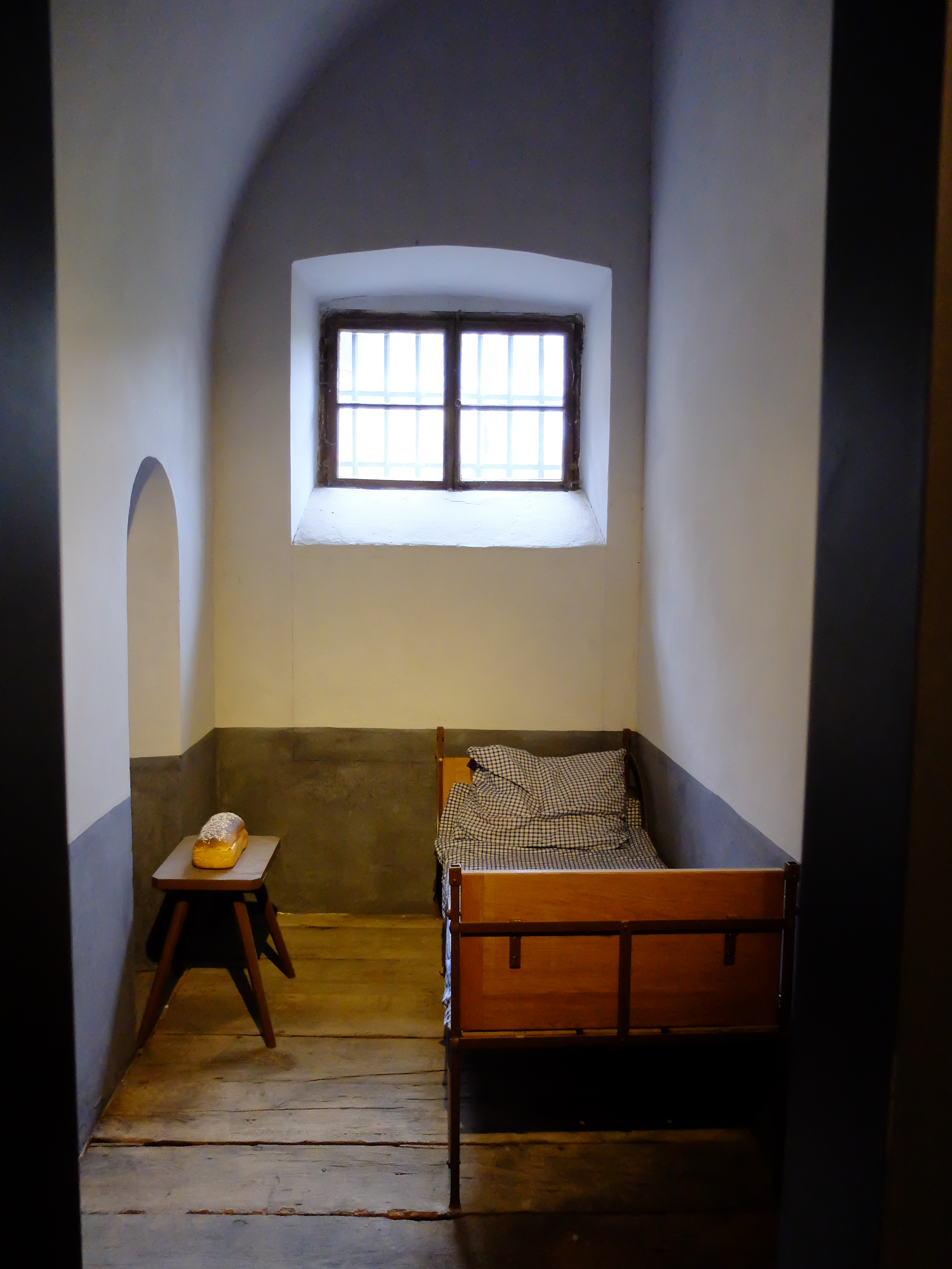 Festung Ehrenbreitstein. Zelle